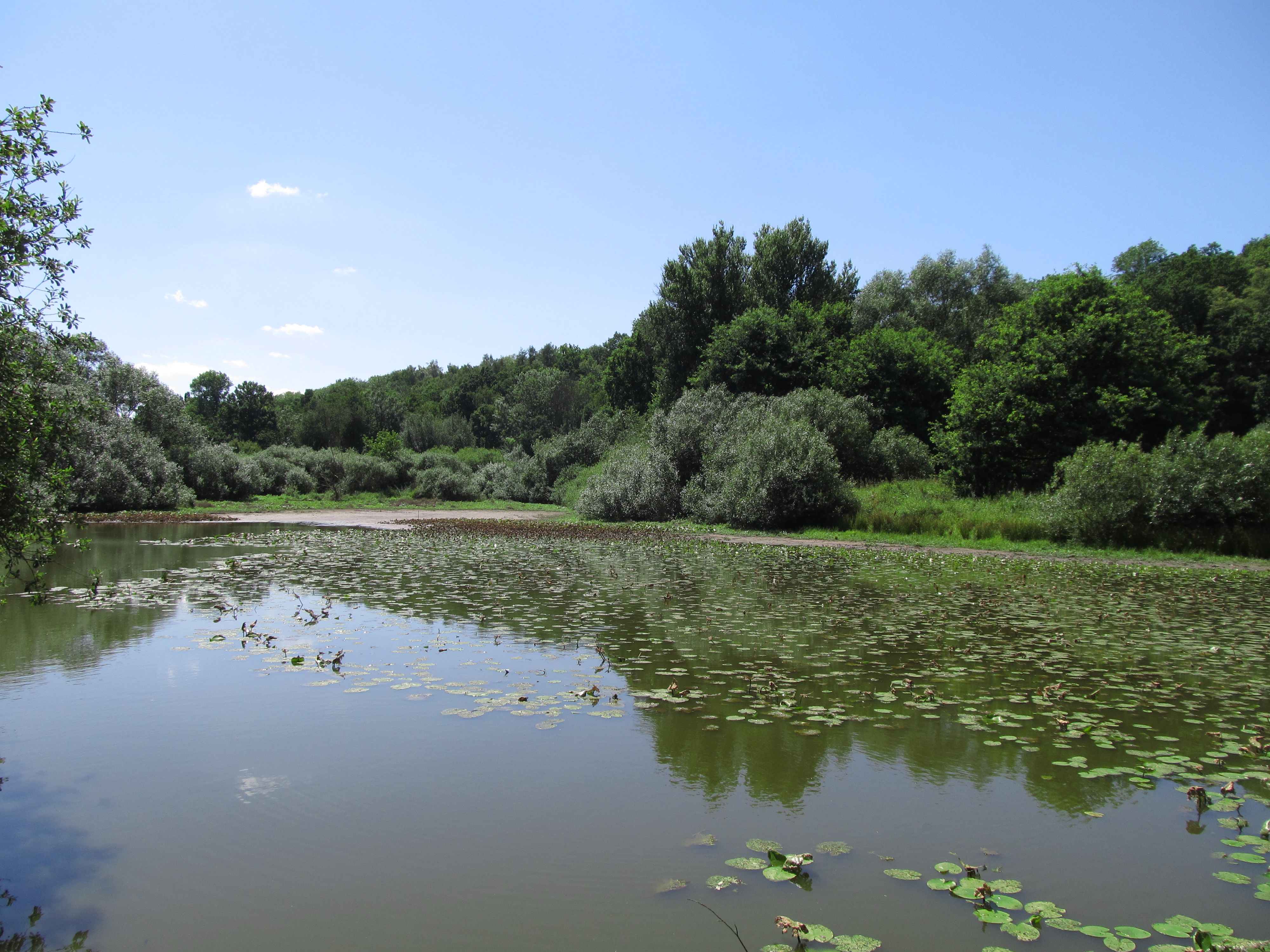 Celkový pohled